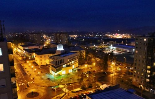 Városközpont